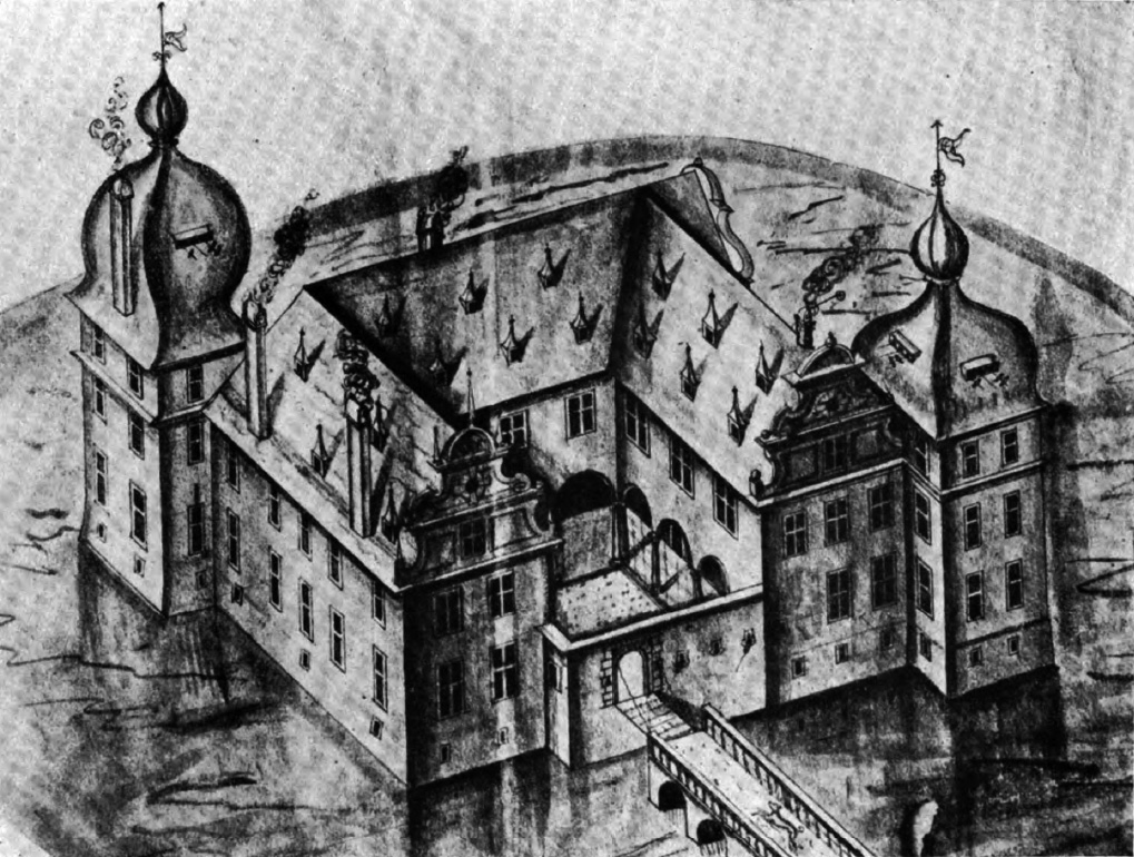 Entwurf für den Neubau des Hauses Honsdorf in Geilenkirchen-Honsdorf